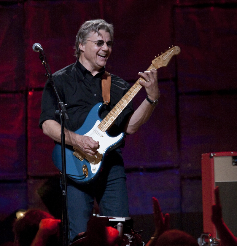 Steve Miller performs on stage